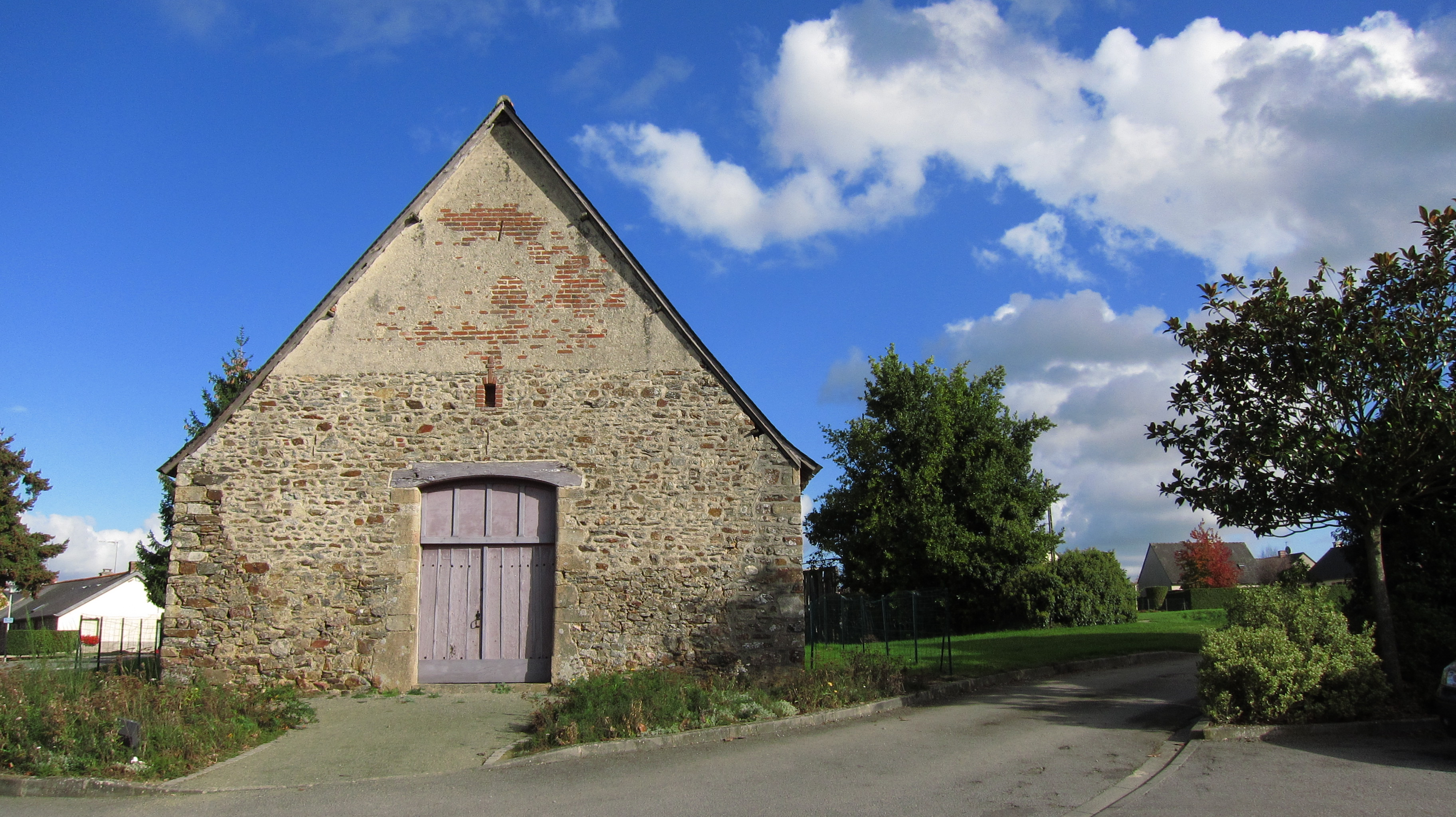 Argentré-du-Plessis (Ille-et-Vilaine, France) : La chapelle Saint-Pierre.